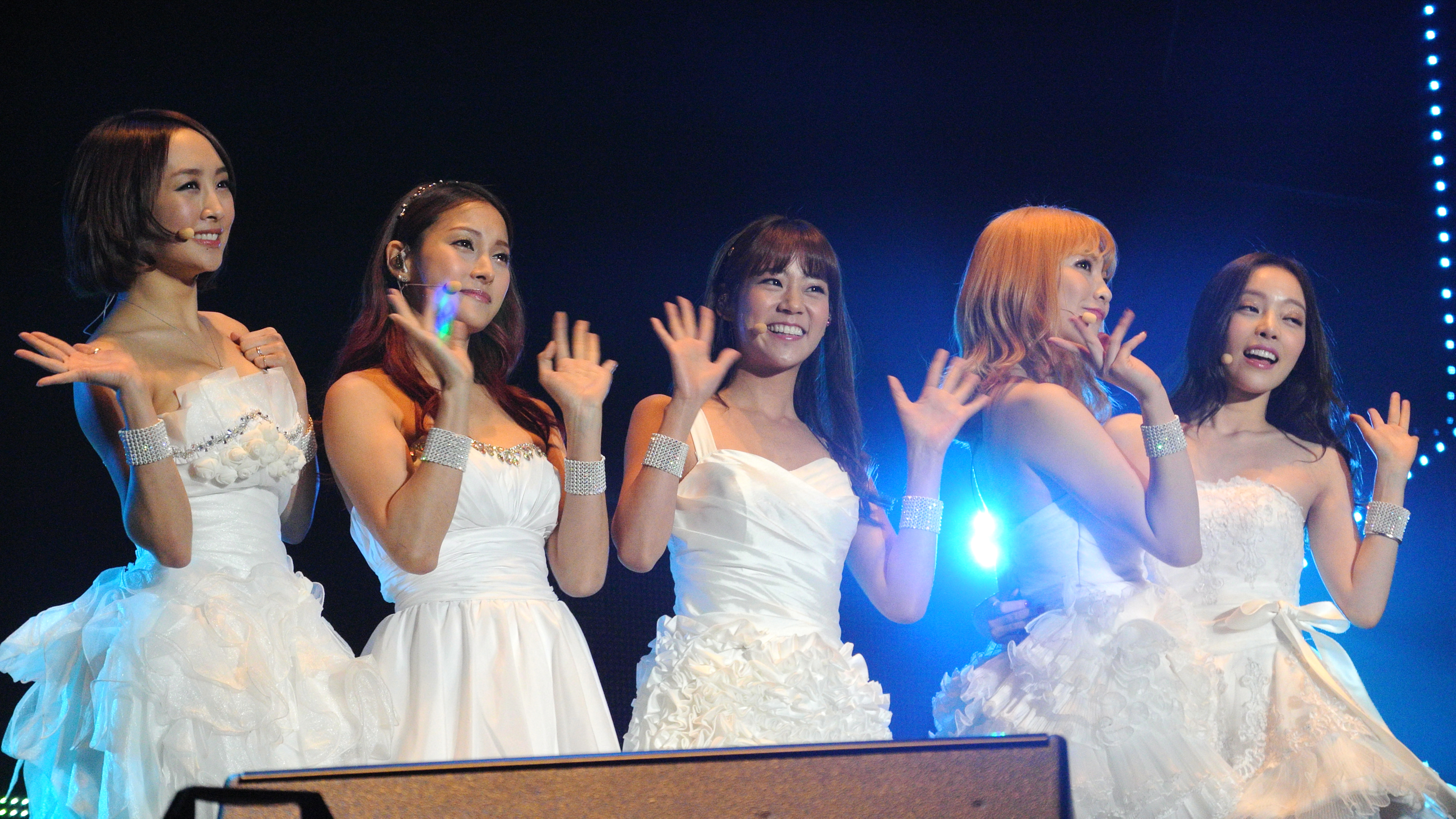 Dec 14, 2013 at 21:20, Seoul 蚕室